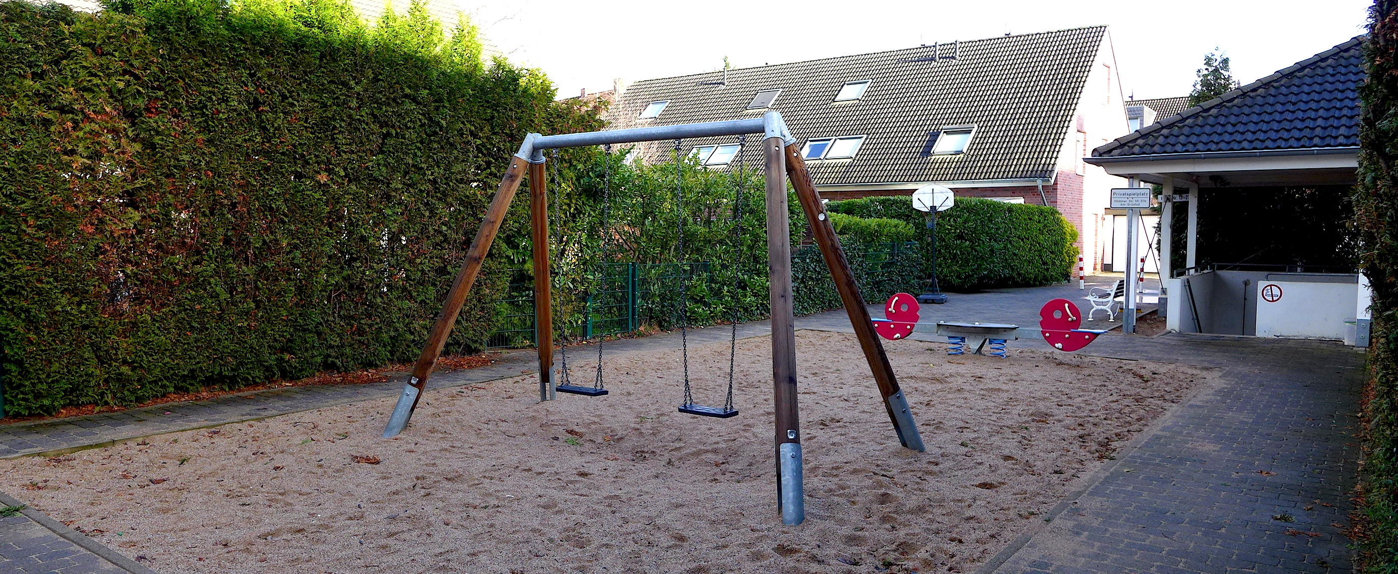 Aм Грюнхоф - улица в Бенрате, Дюссельдорф.